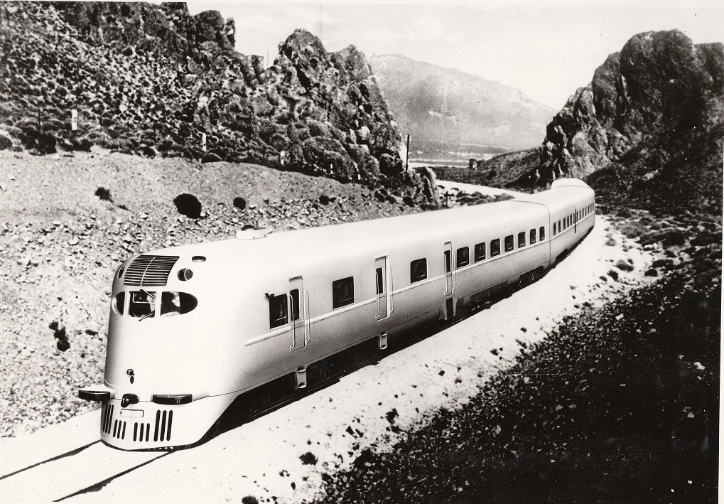 Дизель-поезд ДП «Розария» (трёхвагонный).